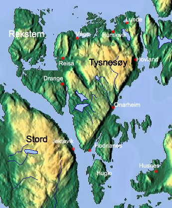 Map of Tysnesnøy.